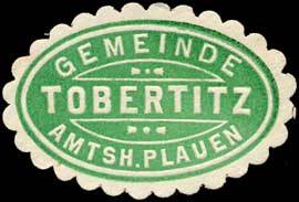 Sealing stamp Title: Gemeinde Tobertitz - Amtshauptmannschaft Plauen Description: grün, weiß, geprägt Place: Tobertitz size: 3x4 cm